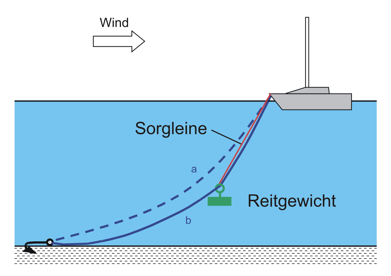 Reitgewicht auf einer Ankerleine eines Schiffes